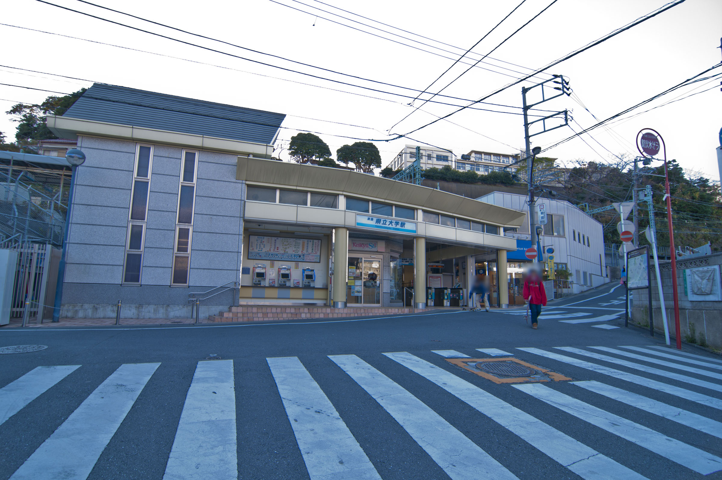 京浜急行電鉄本線県立大学駅